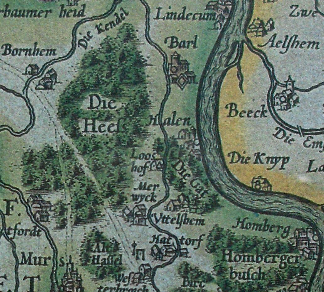 Ausschnit der Karte der Grafschaft Moers, gestochen von Johannes Mercator 1591